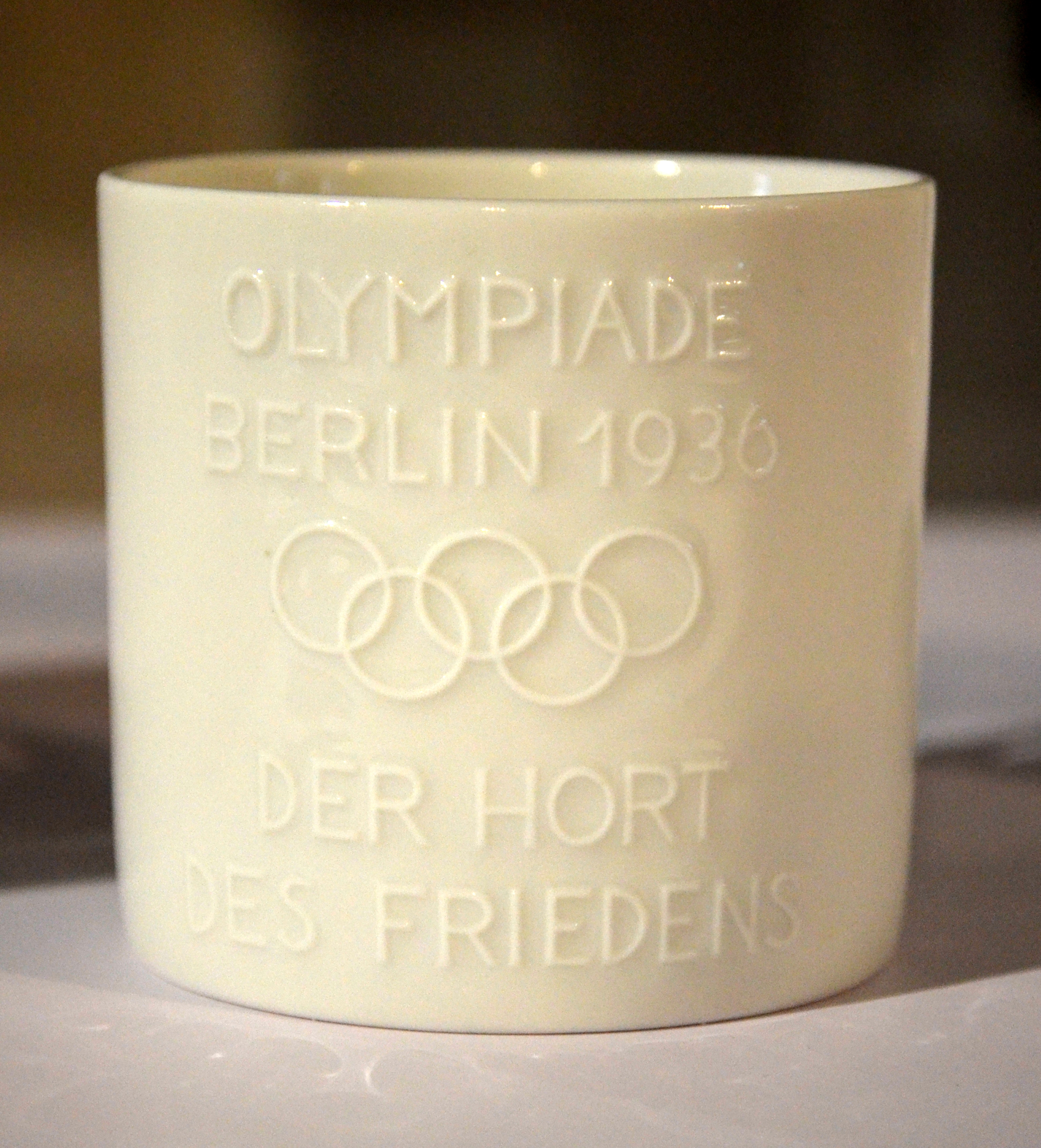 Souvenir der Olympischen Sommerspiele 1936 in Berlin: Tasse der Porzellanmanufaktur Fürstenberg. Aufschrift: „Olympiade Berlin 1936. Der Hort des Friedens“